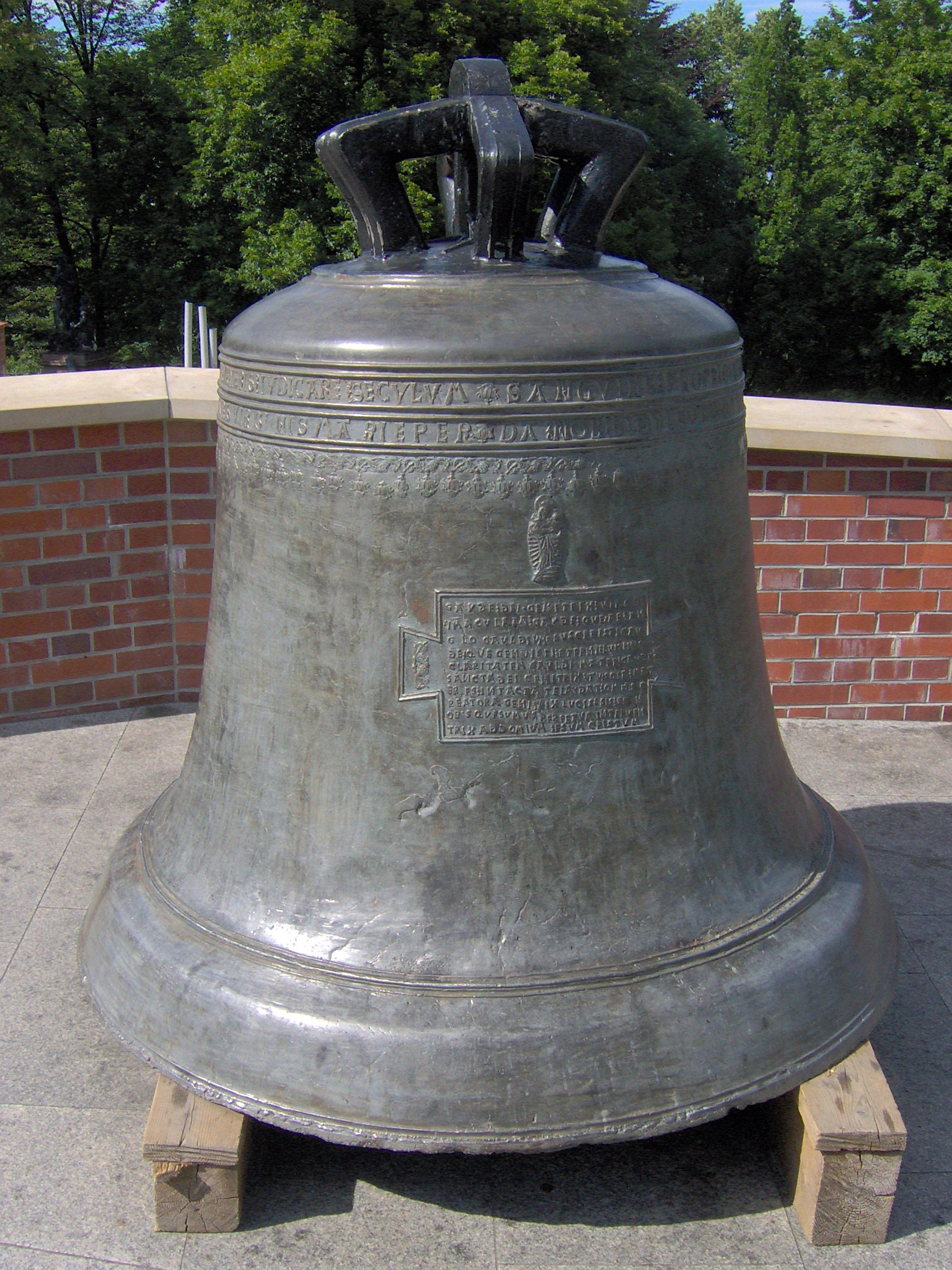 Dzwon z Jasnej Góry